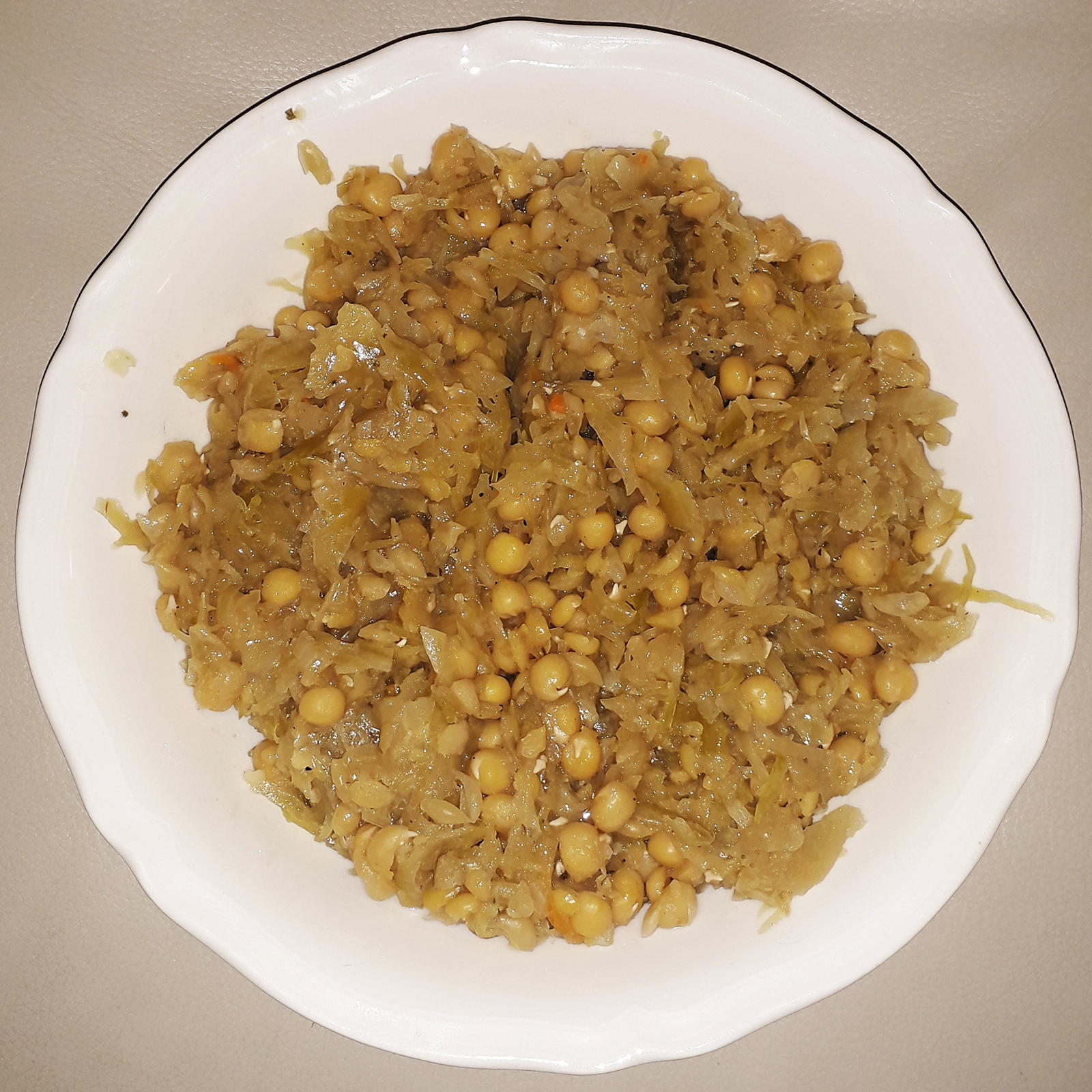 Groch z kapustą - potrawa wigilijna